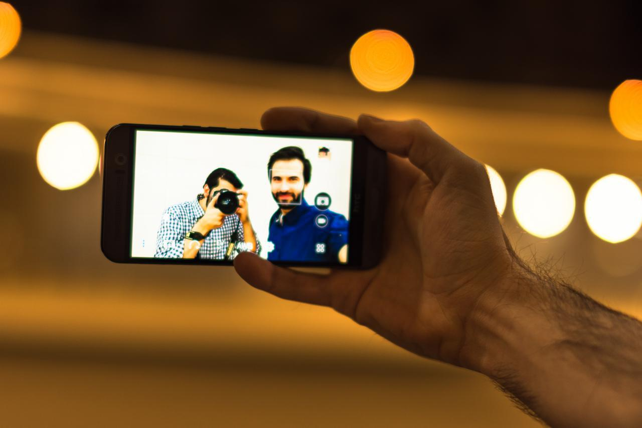 Two man takes a selfie with a cellphone camera and DSLR camera with bokeh effect.